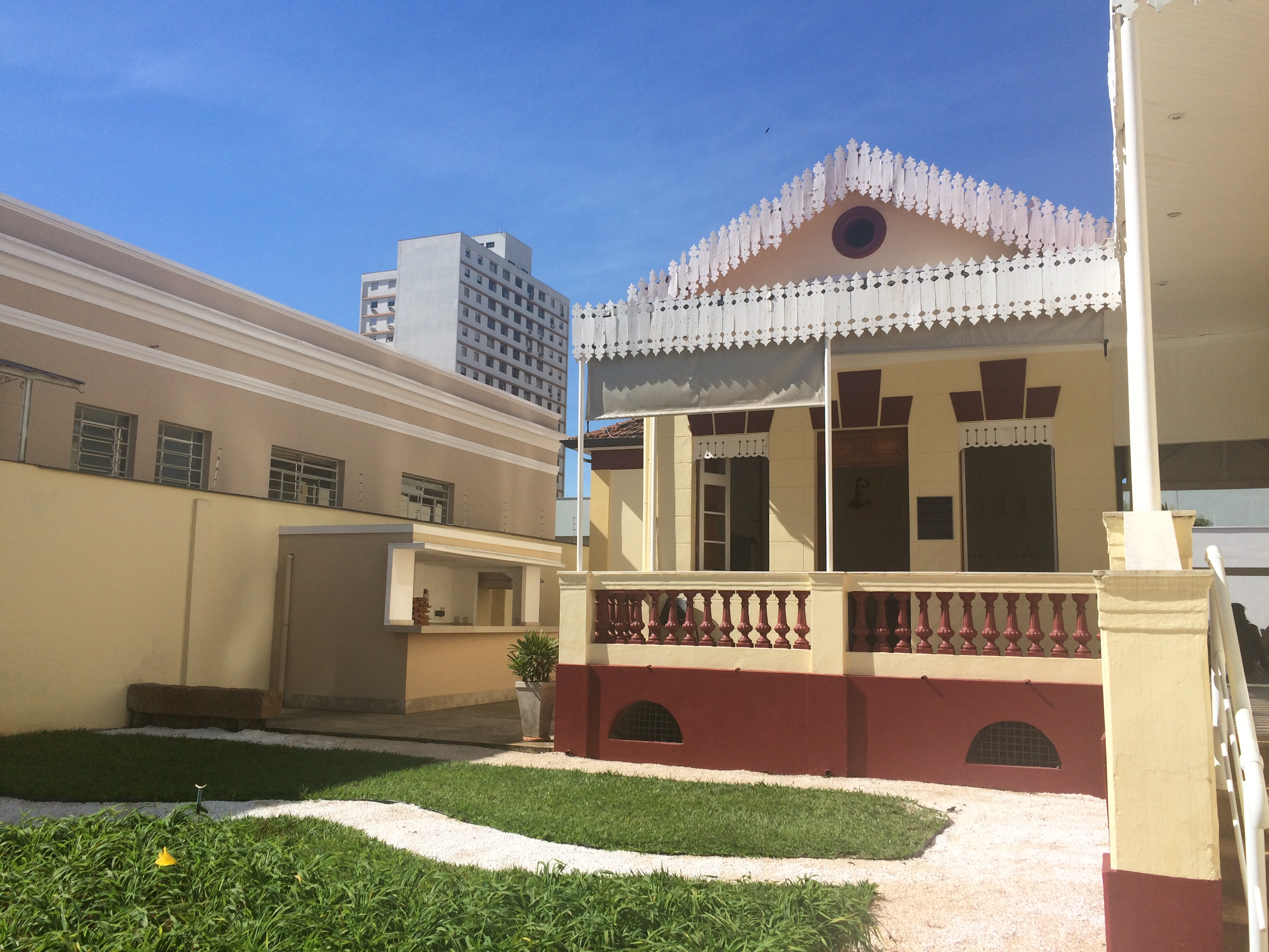 Acervo móvel depositado no atual “Museu Histórico e Pedagógico Prudente de Moraes”